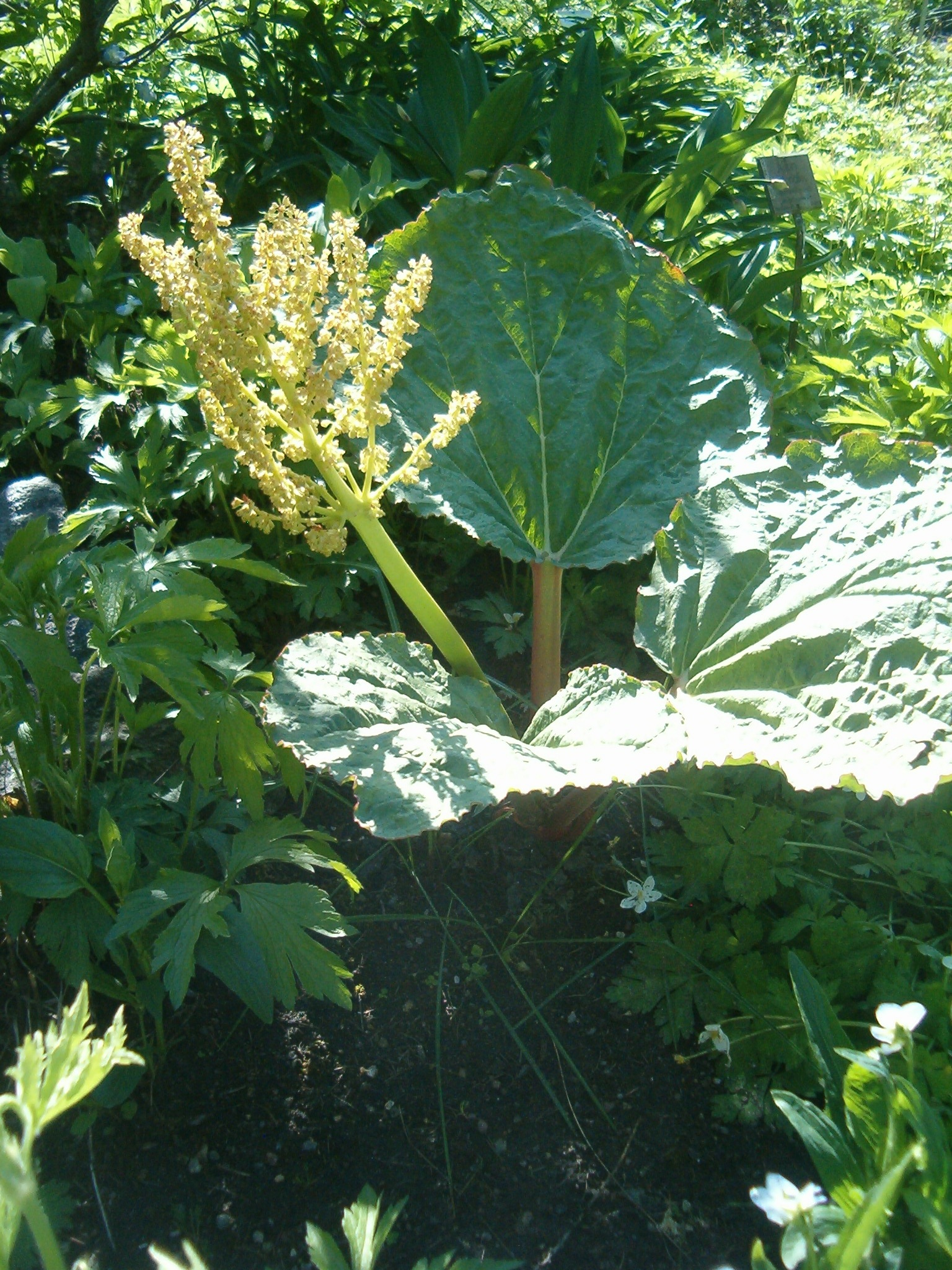 At Botanical Gardens Berlin-Dahlem Species Rheum fedtschenkoi